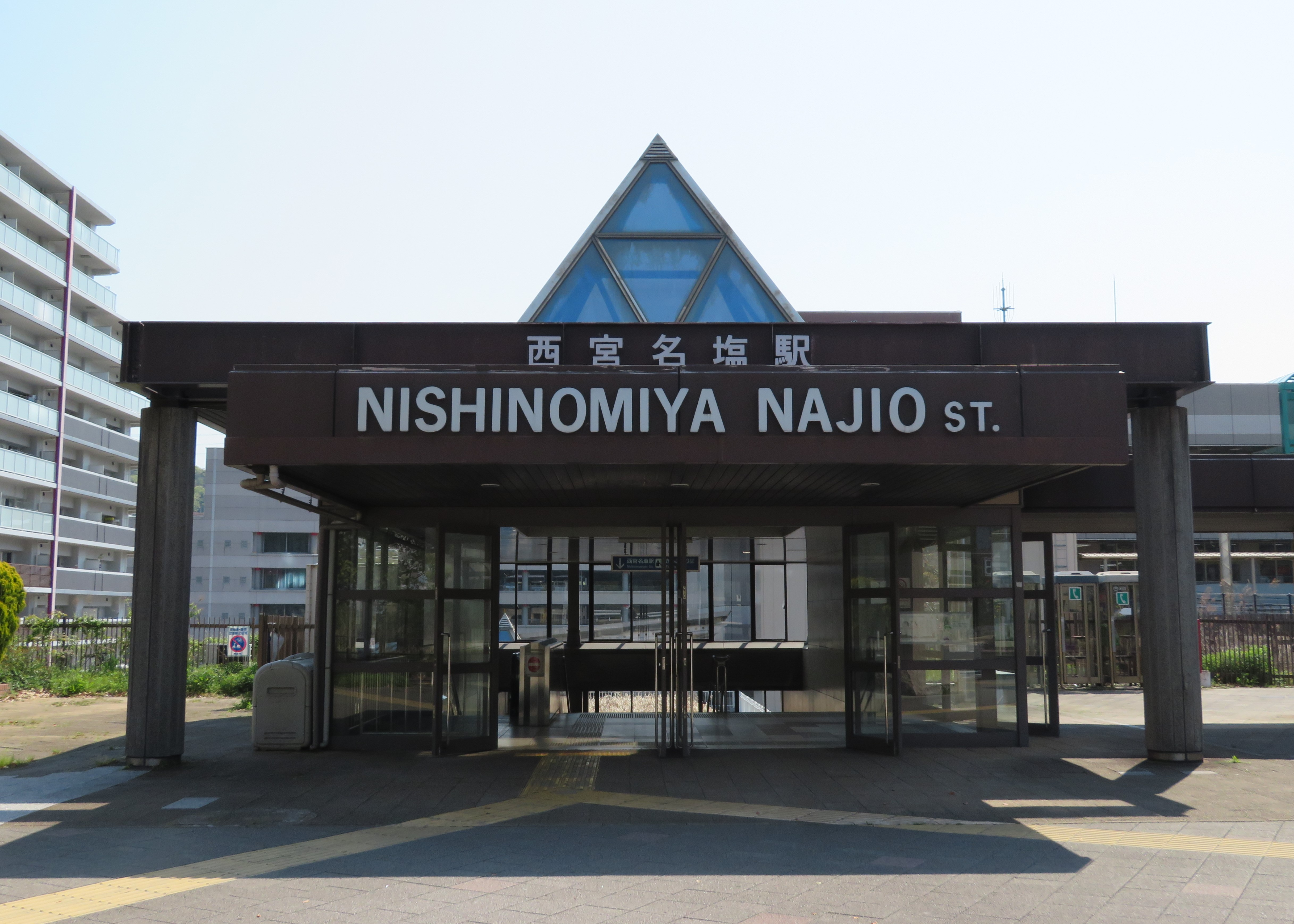 JR西宮名塩駅